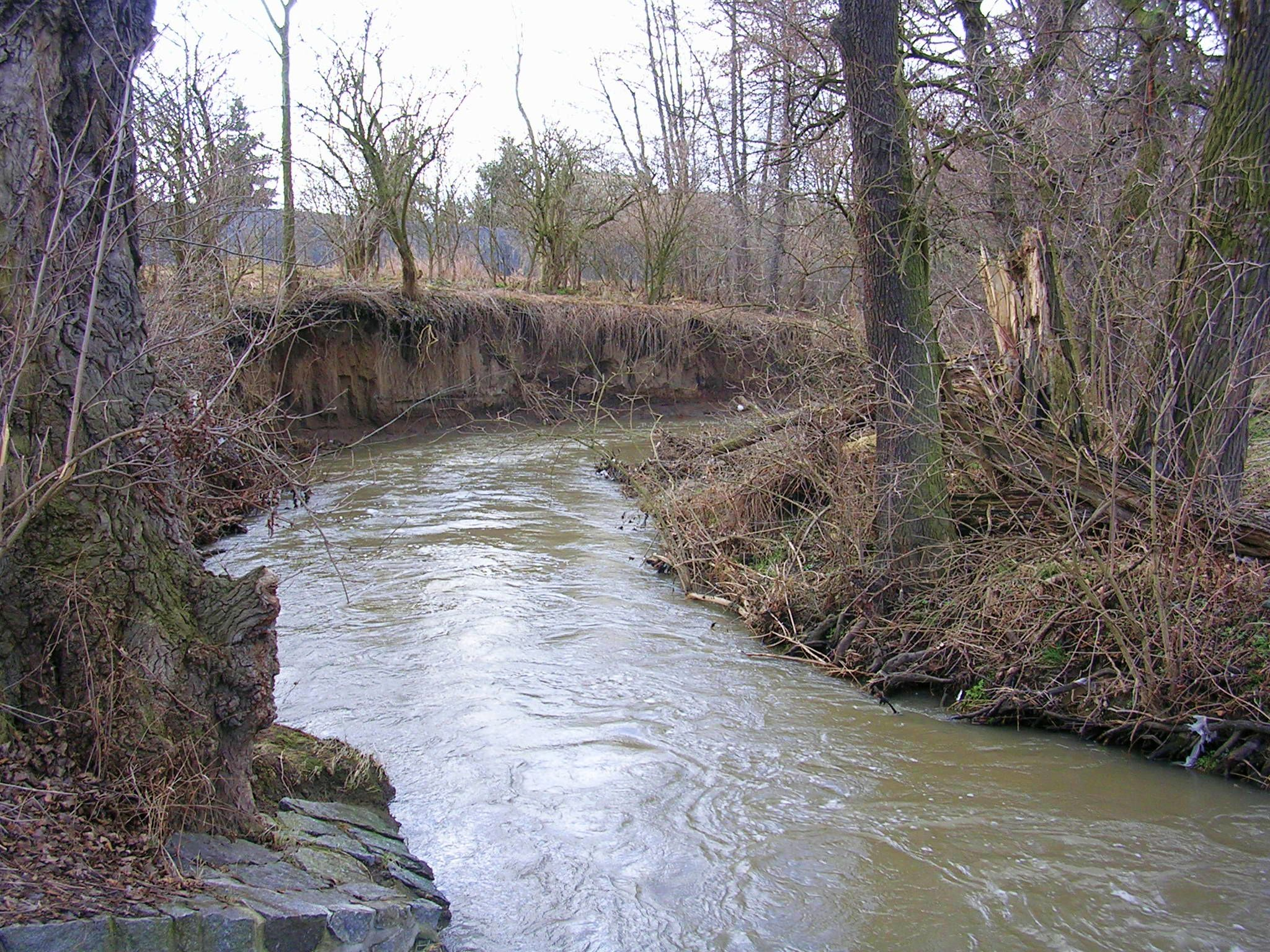 Botič u Zahradního Města. 1.4.2006.